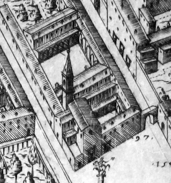 Pianta del buonsignori, dettaglio 097 san marco padri